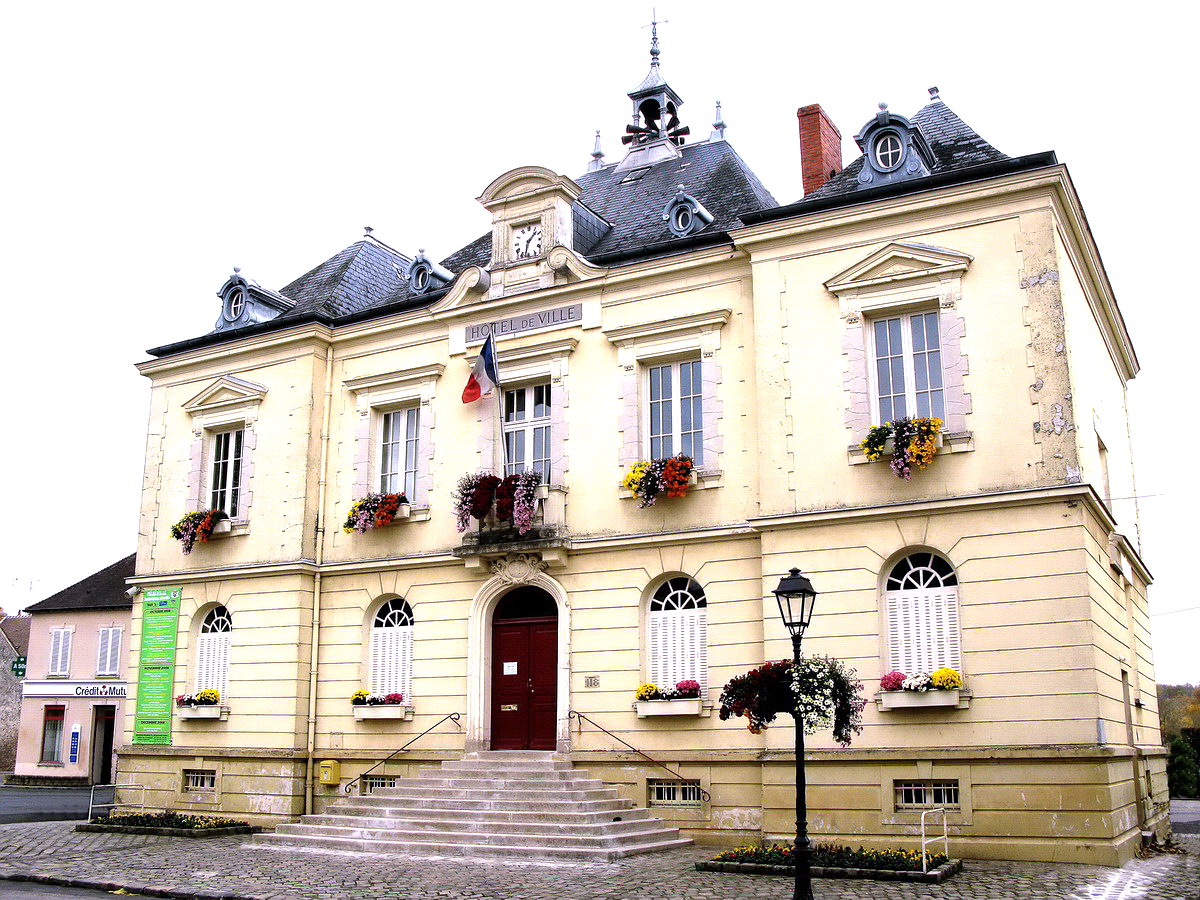 Méréville_(Essonne)_Hôtel_de_ville